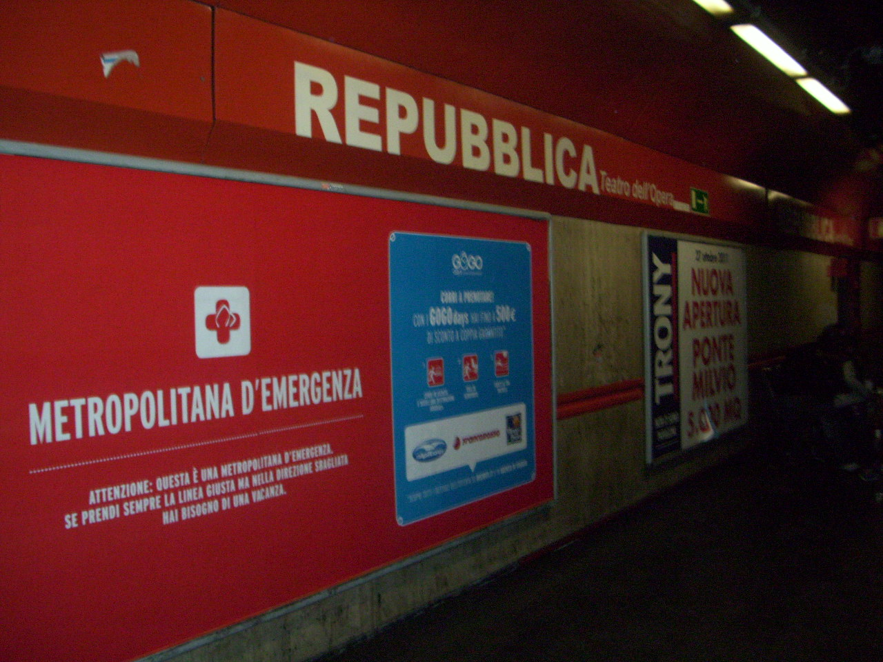 Stazione di Repubblica Teatro dell'opera